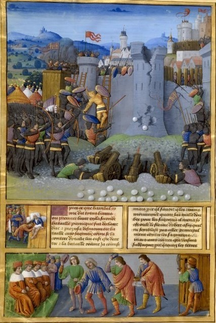 Romuleon-BnF366-fol. 2v Envoyés de Sagonte à Rome